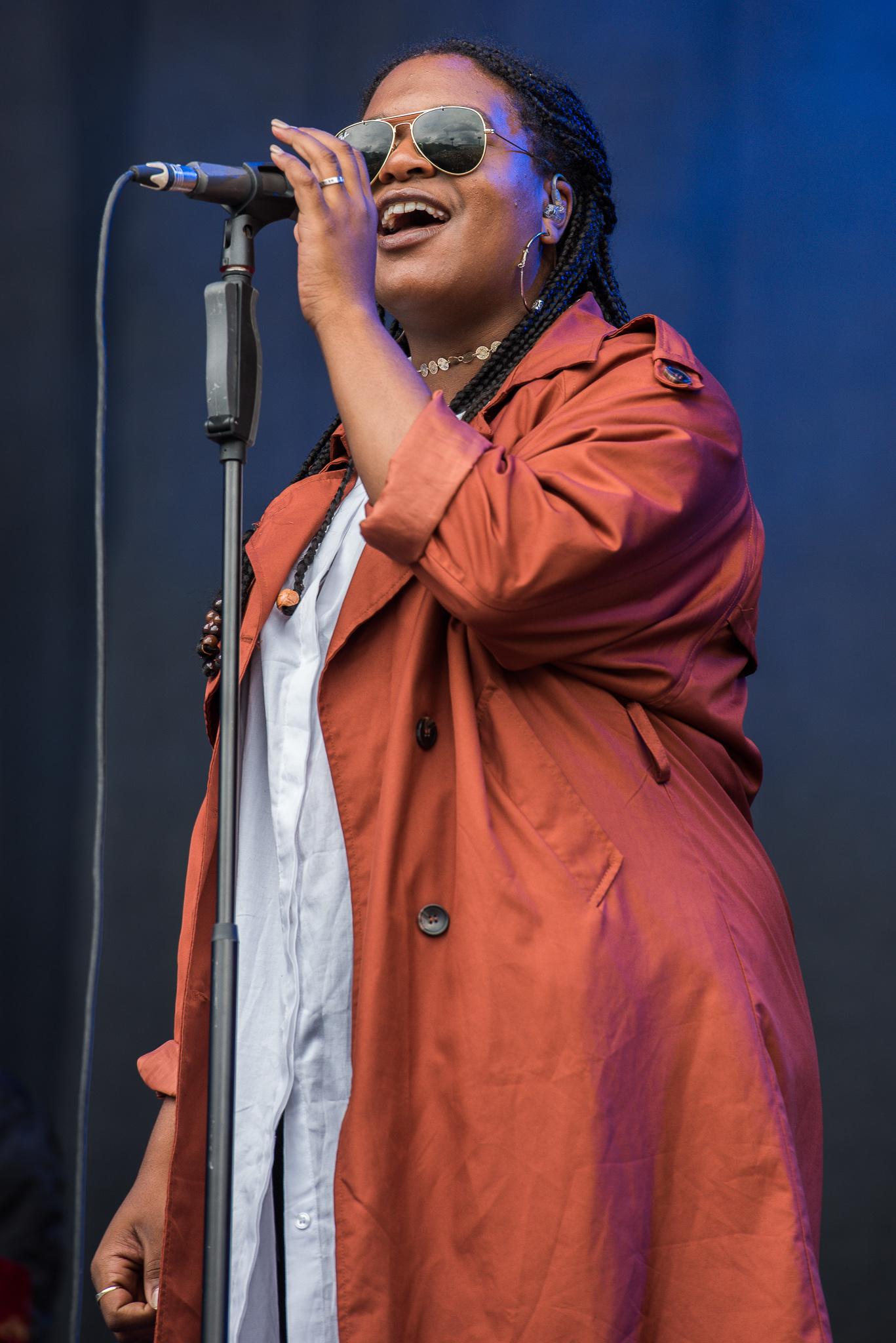 ARGO-Konzerte,Beck's Park Stage,Bri Bryant,Konzert,Livekonzert,Livemusik,Musik,RiP,Rock im Park 2017,Welshly Arms